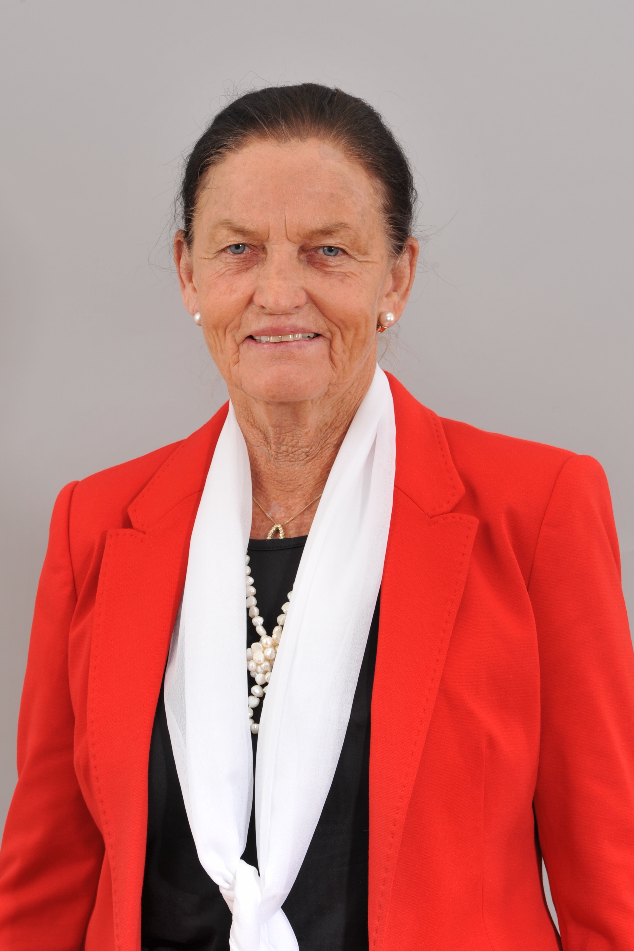 Landtagsprojekt Salzburg: Rosemarie Blattl